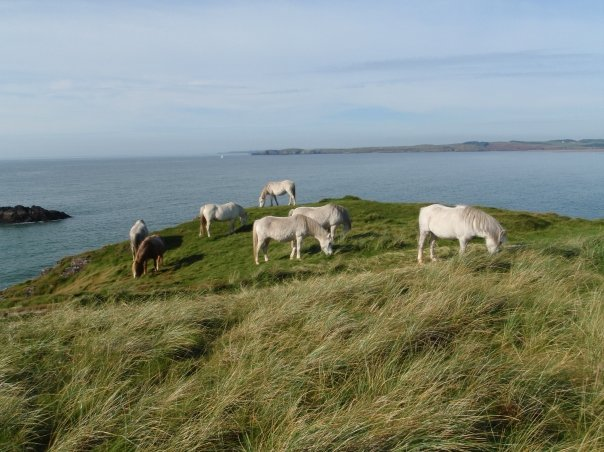 Merlod yn pori moresg ar Ynys Llanddwyn